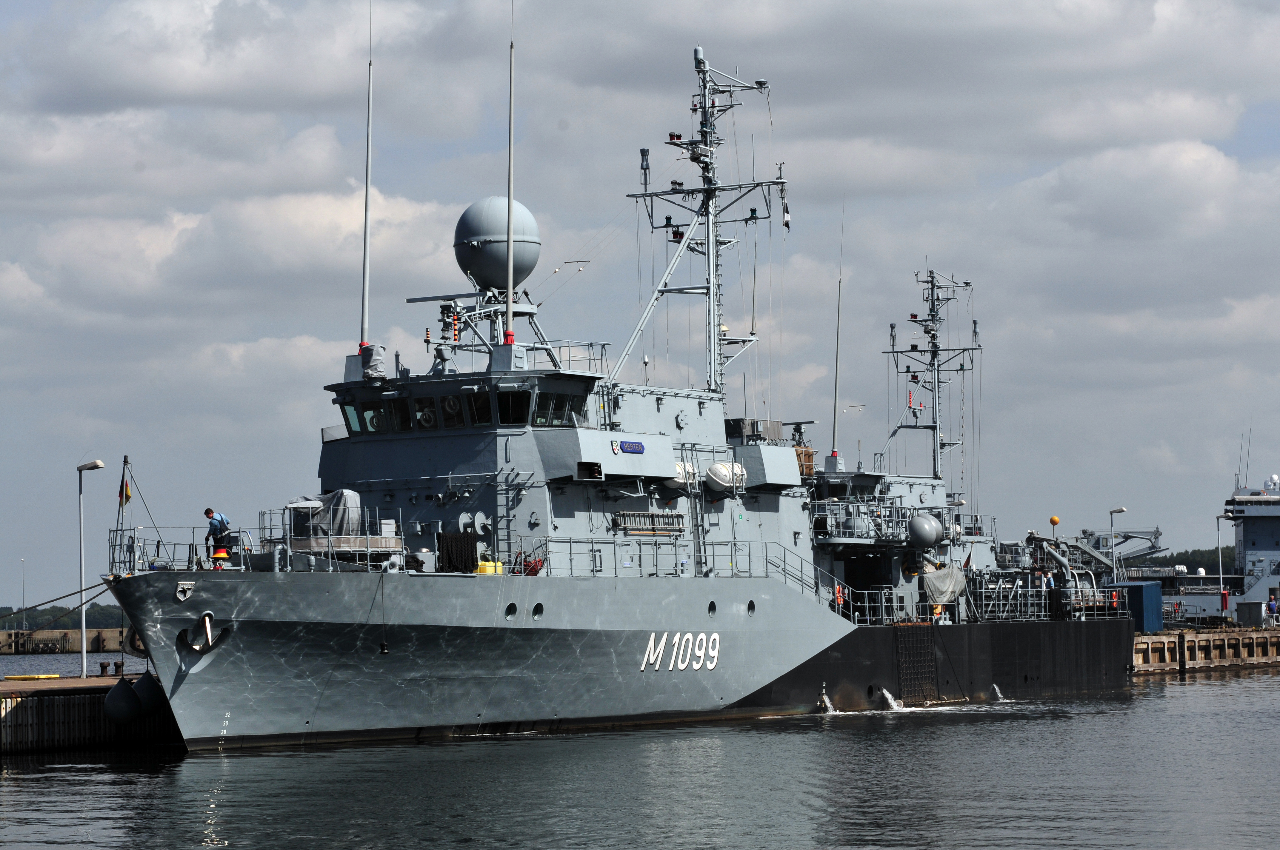 Minenjagdboot Herten der Deutschen Marine an der Weddigenbrücke im Marinestützpunkt Kiel